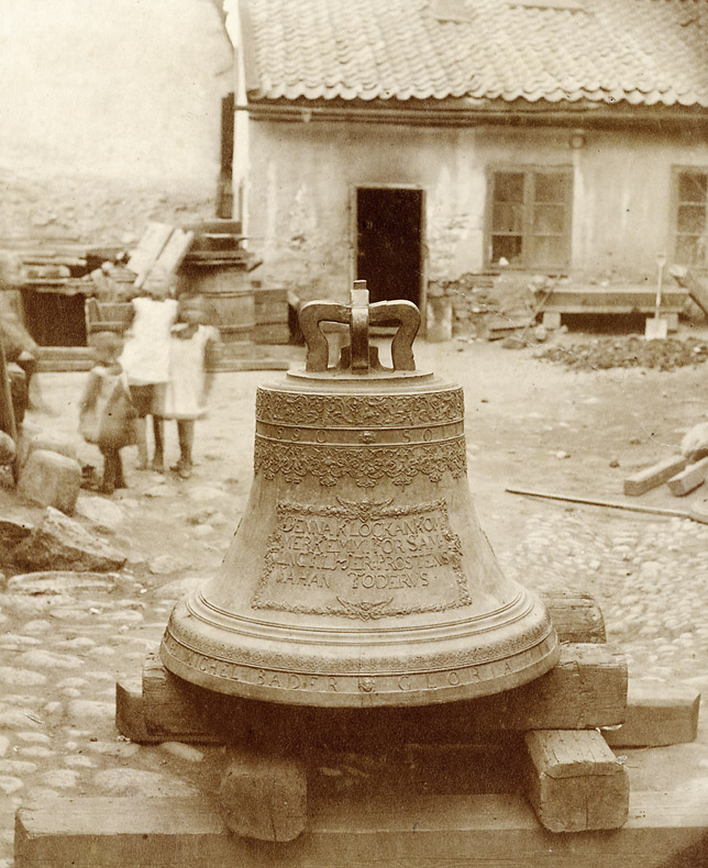 Barn på gård med kyrkklocka från Kemi kyrka. Gården hör troligen till Beckmans gjuteri i Stockholm, där klockan blev omgjuten 1886. Motiv: Kemi kyrkklocka Kategori: (10) Klockor, GjuteriBarn på gård med kyrkklocka från Kemi kyrka. Gården hör troligen till Beckmans gjuteri i Stockholm, där klockan blev omgjuten 1886.